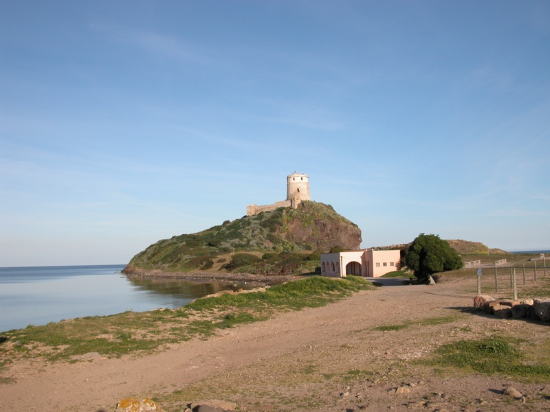 Torre del Coltellazzo, Nora (Italia)